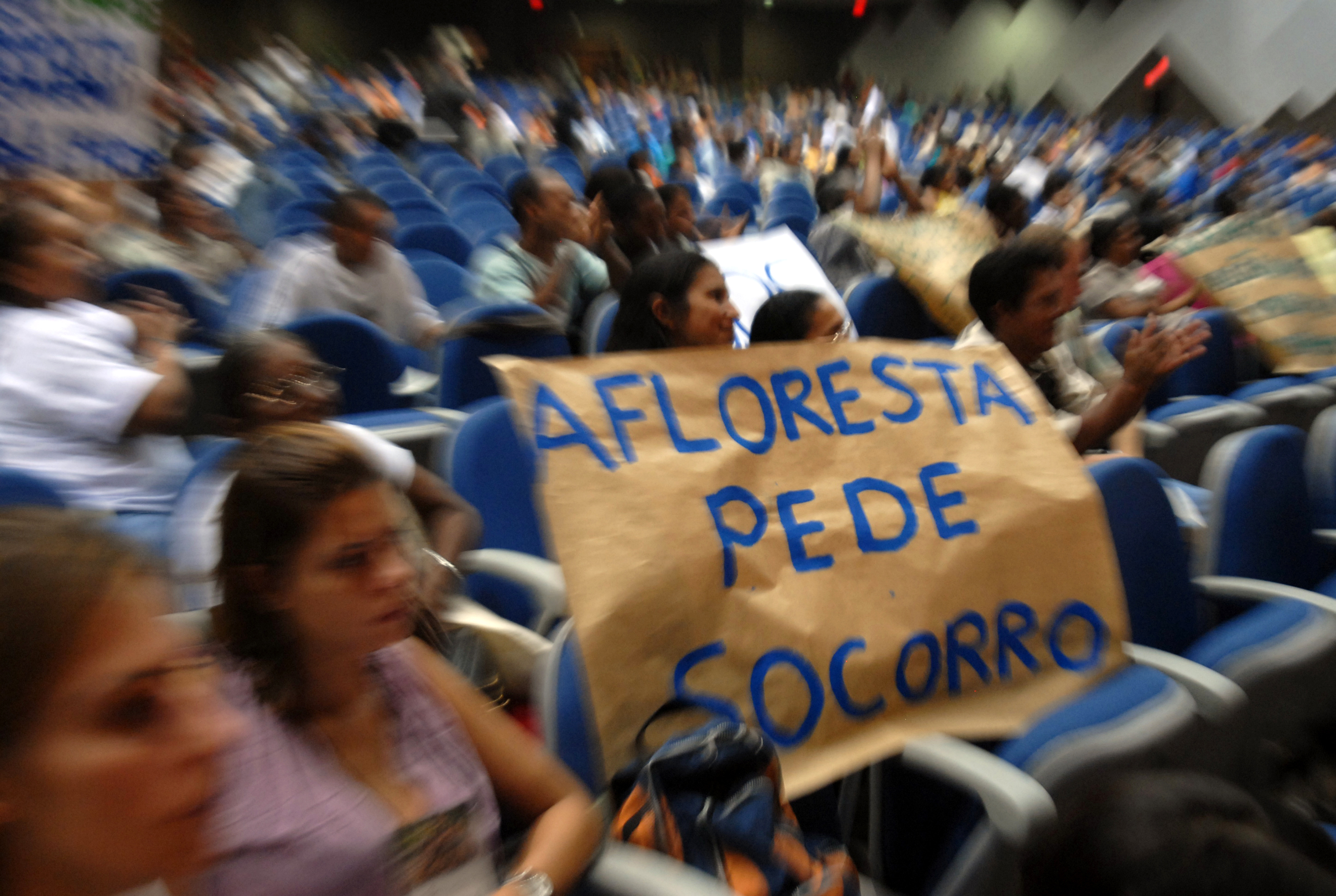 Brasília - Representantes dos povos das florestas - seringueiros, índios, quilombolas - apresentam reivindicações durante 2º Encontro Nacional no Centro de Convenções Ulysses Guimarães